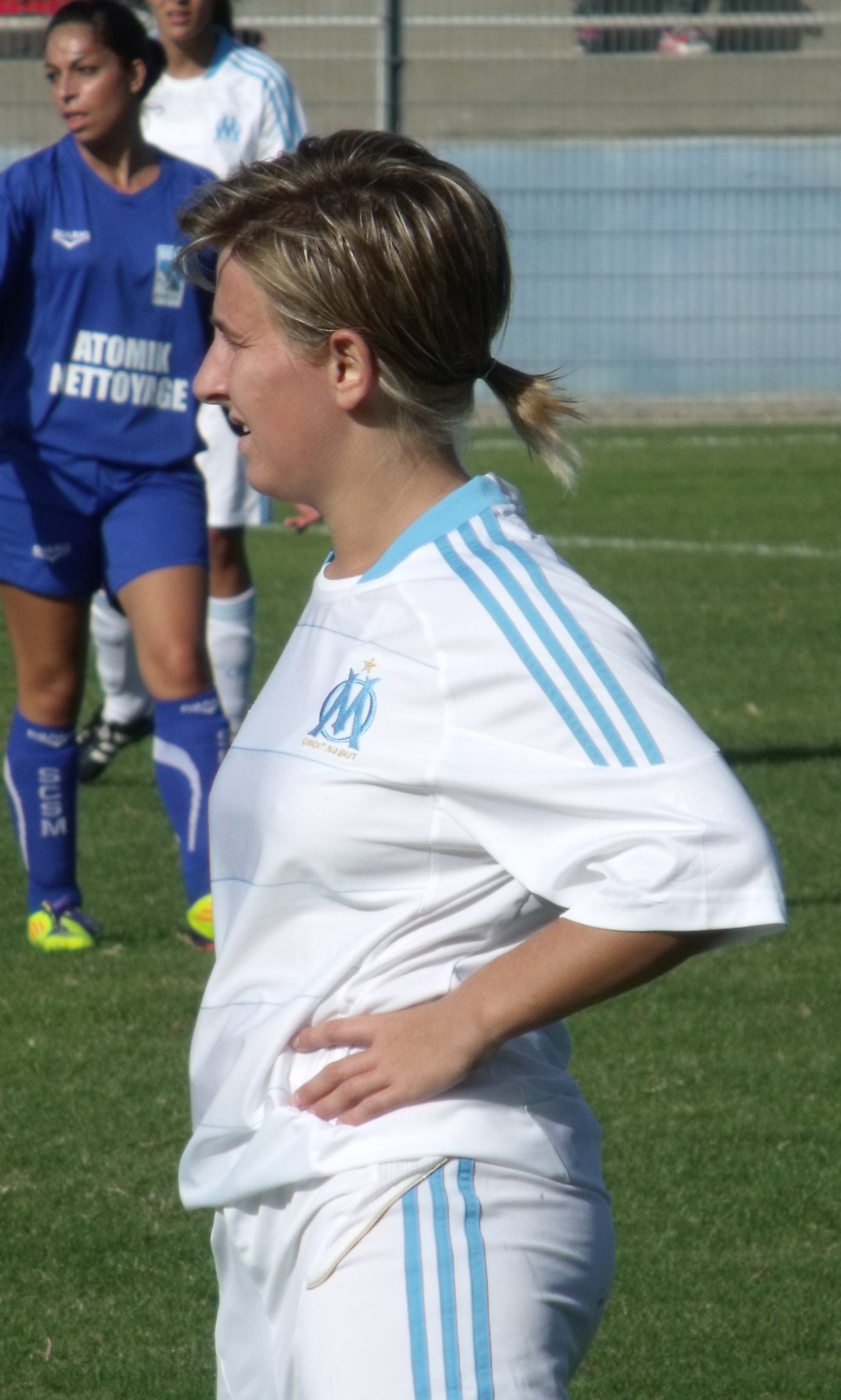 Angéline Guillemard, attaquante de l'OM féminines lors du match Saint-Martin-de-Crau-OM 16/10/2011